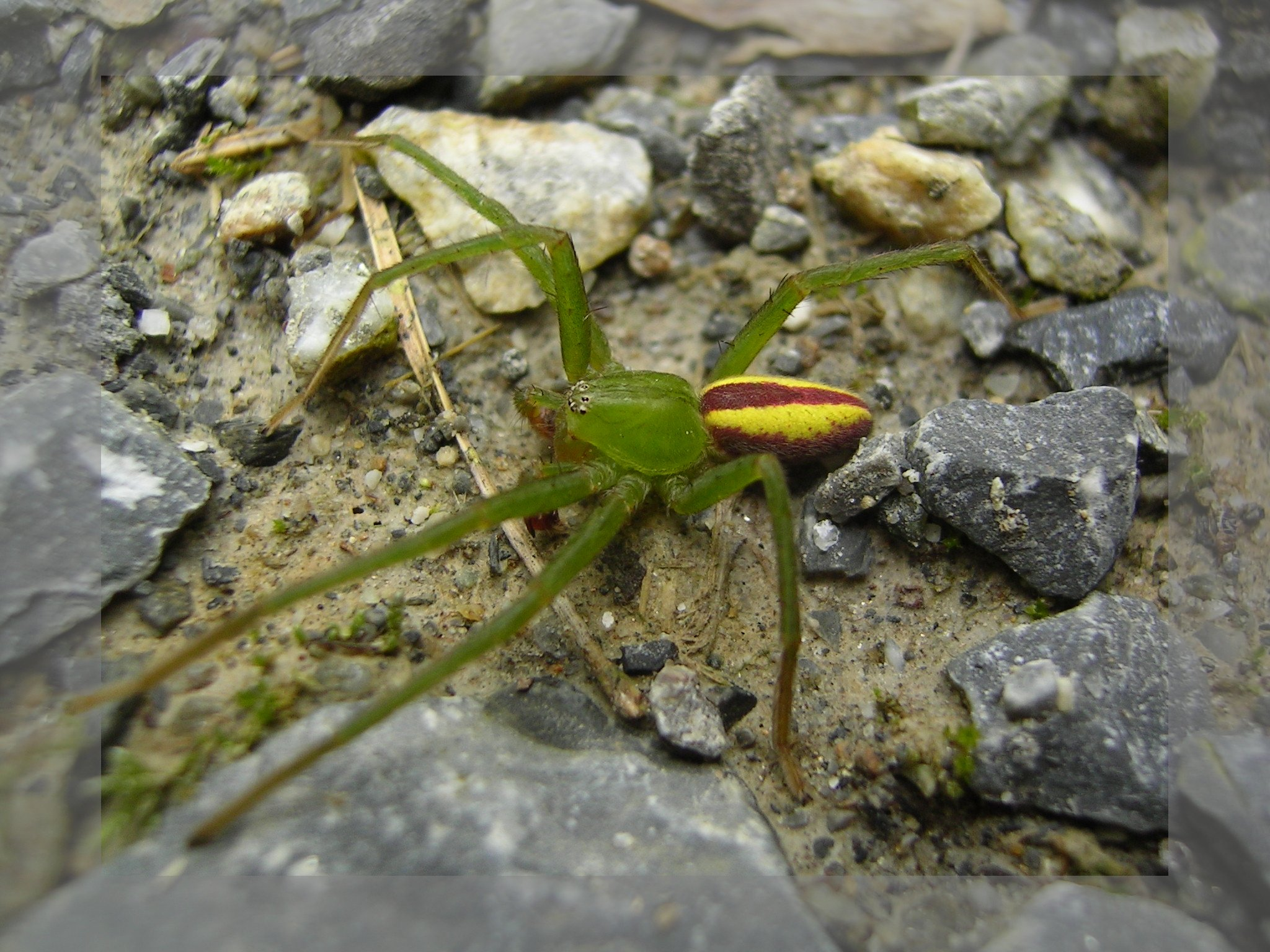 Grüne Huschspinne ♂ (Micrommata virescens) auf einem Kiesweg im Berner Oberland (CH)